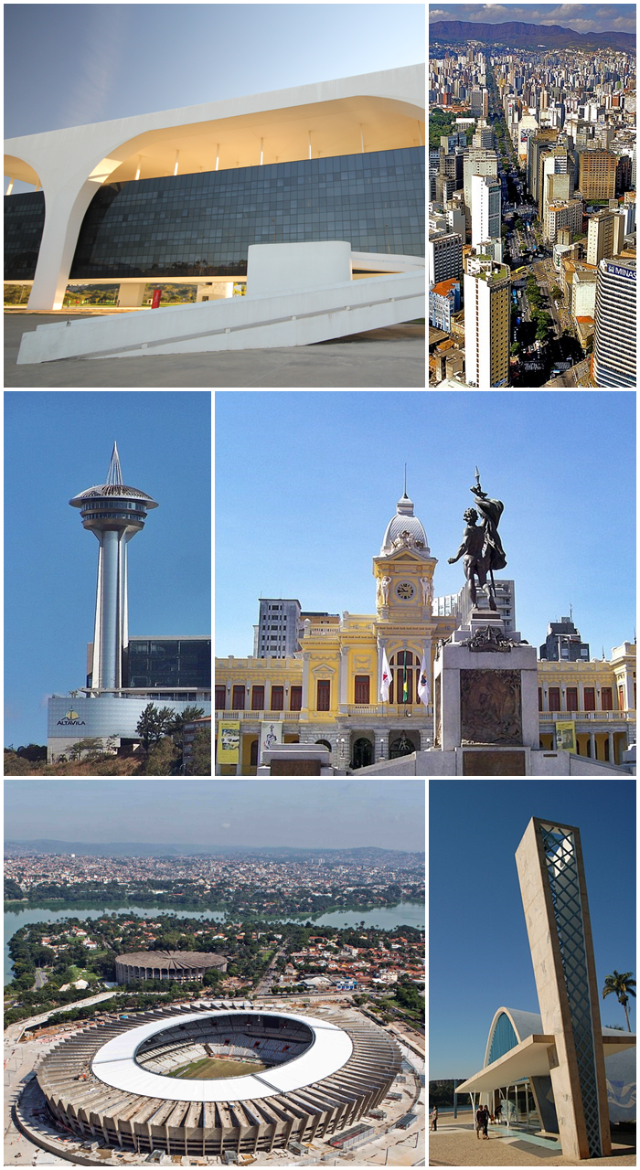 Do topo, em sentido horário: Cidade Administrativa, sede do governo estadual; Avenida Afonso Pena com a Serra do Curral ao fundo; Estátua do Monumento à Civilização Mineira, na Praça da Estação; Igreja São Francisco de Assis, parte do Conjunto Arquitetônico da Pampulha; Estádio do Mineirão com a Lagoa da Pampulha ao fundo e Torre Alta Vila, na divisa com o município de Nova Lima.